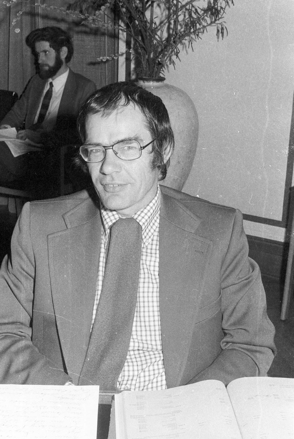 in der Ratsversammlung. Im Hintergrund links Helmut Zech, städtischer Beschäftigter im Amt für Entwicklungsplanung.